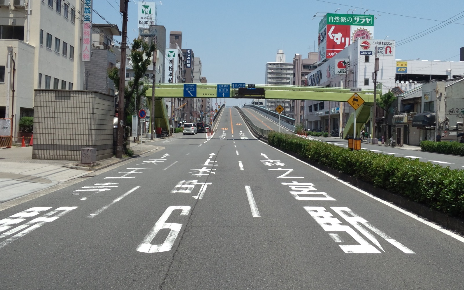 天王寺バイパスを南から望む